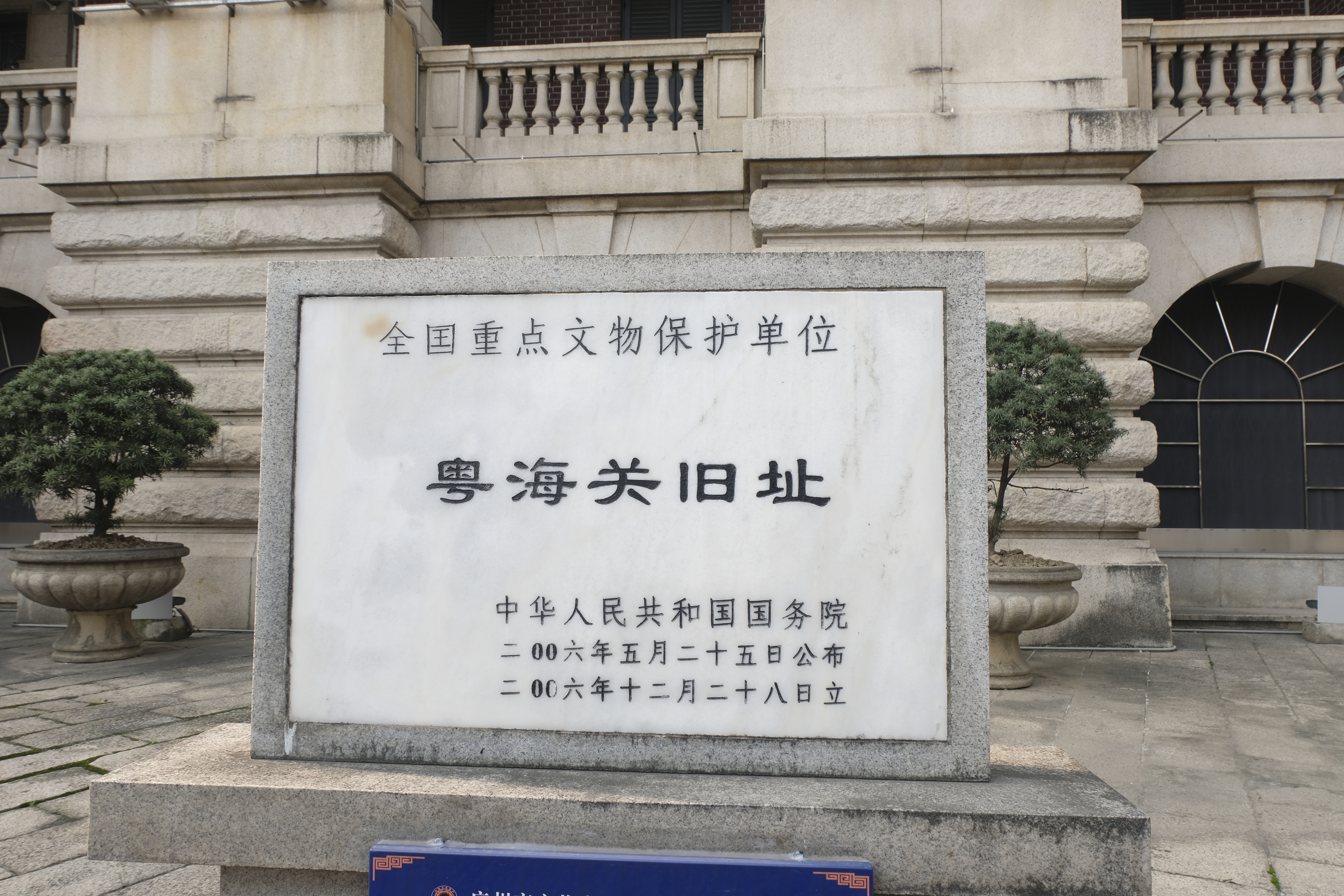 粤海关旧址国保碑